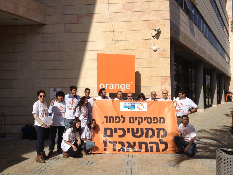 התאגדות עובדי פרטנר